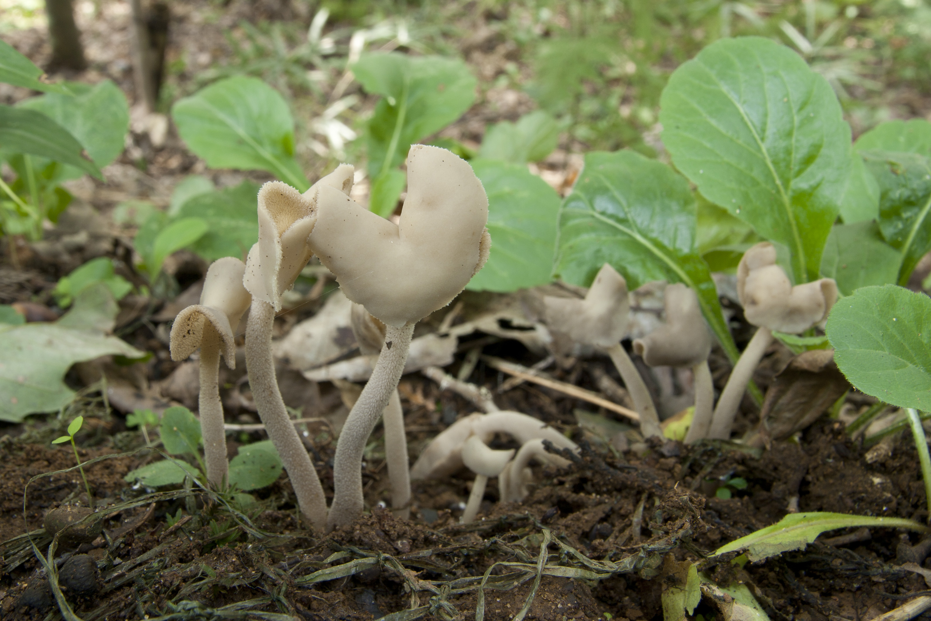 アシボソノボリリュウタケ (学名：Helvella elastica)